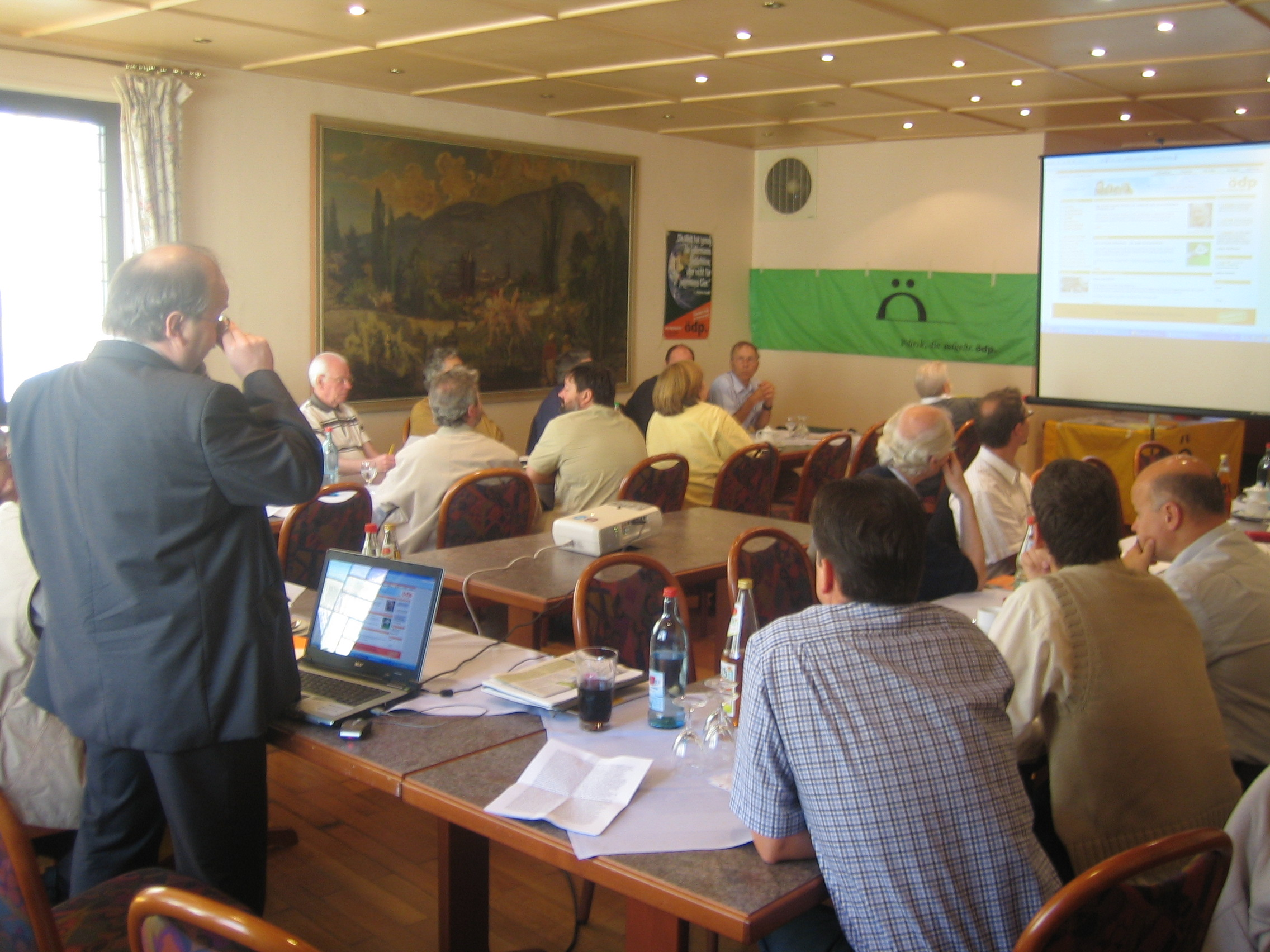 ödp-Landesparteitag in Rheinland-Pfalz